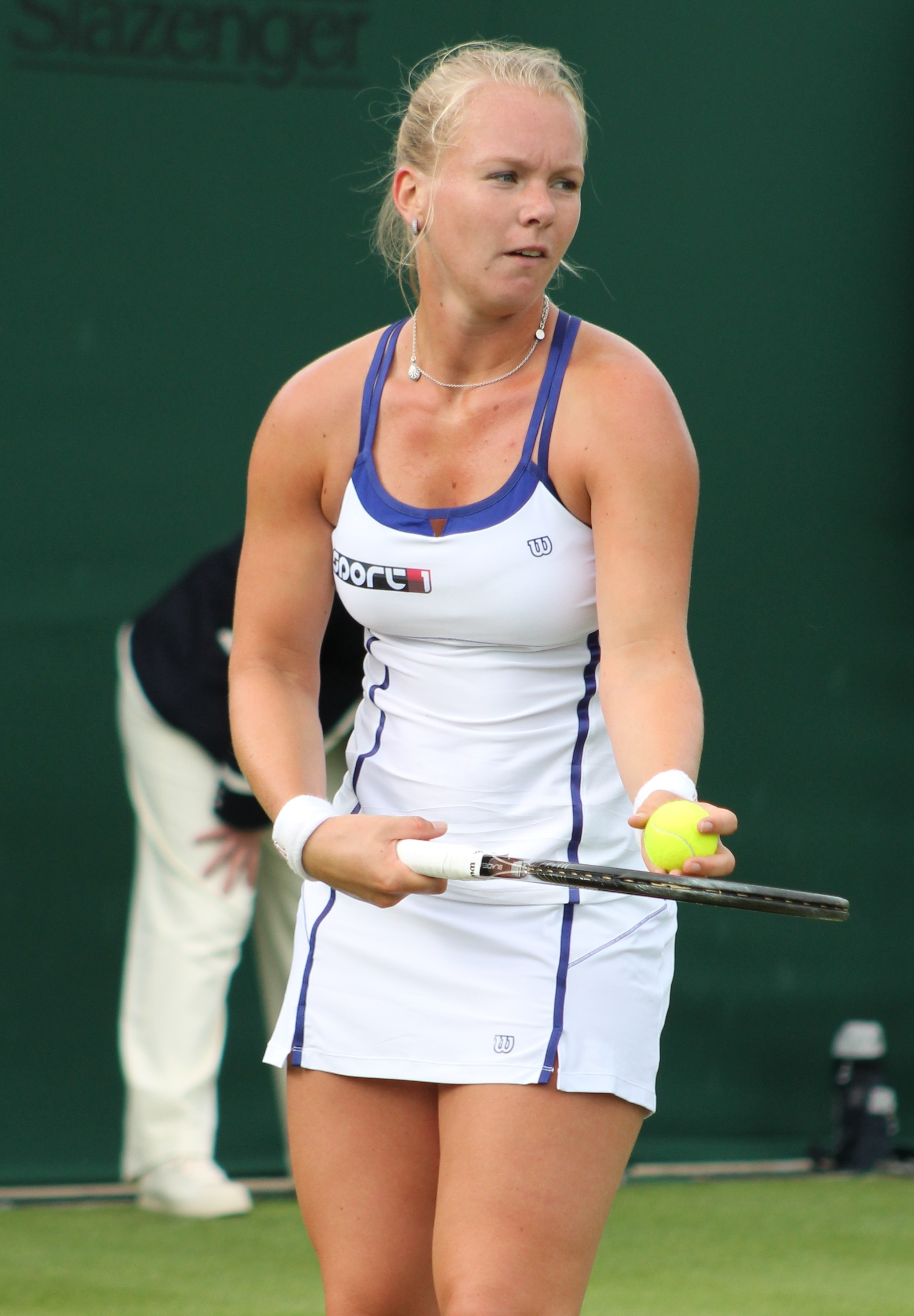 Bertens WM13-005